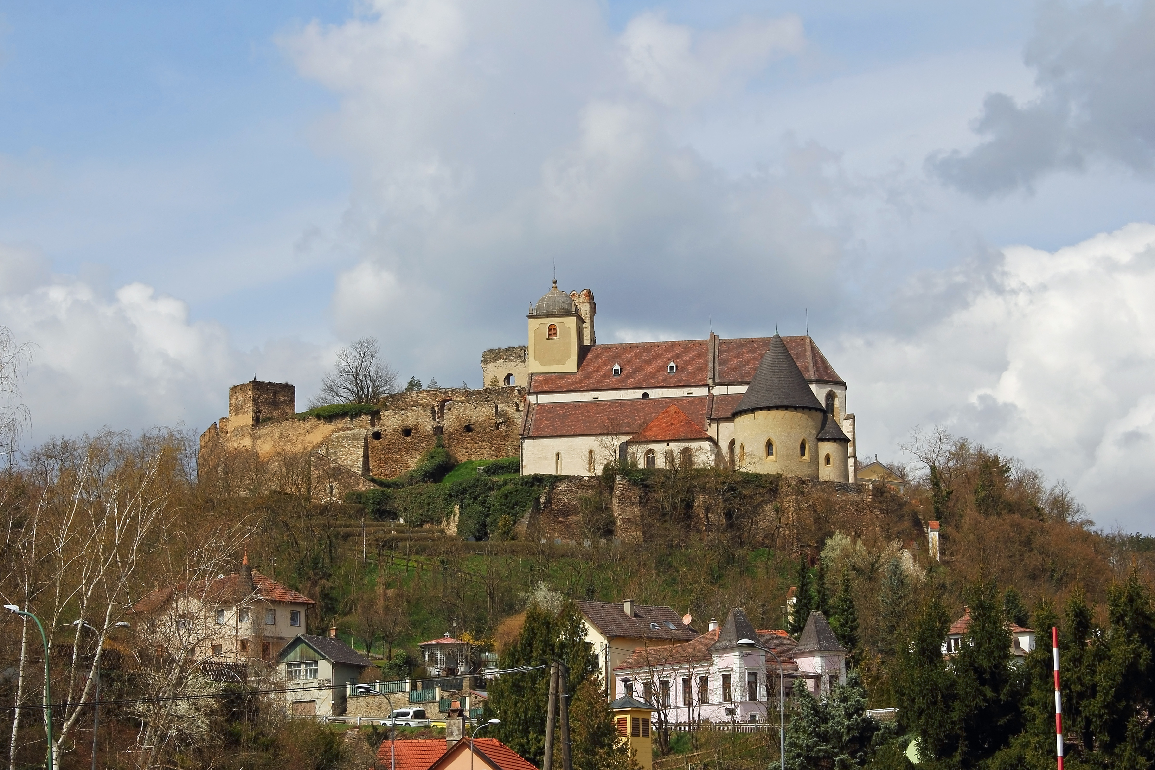 Kath. Pfarrkirche hl. Gertrud und Burgruine Gars in Thunau am Kamp